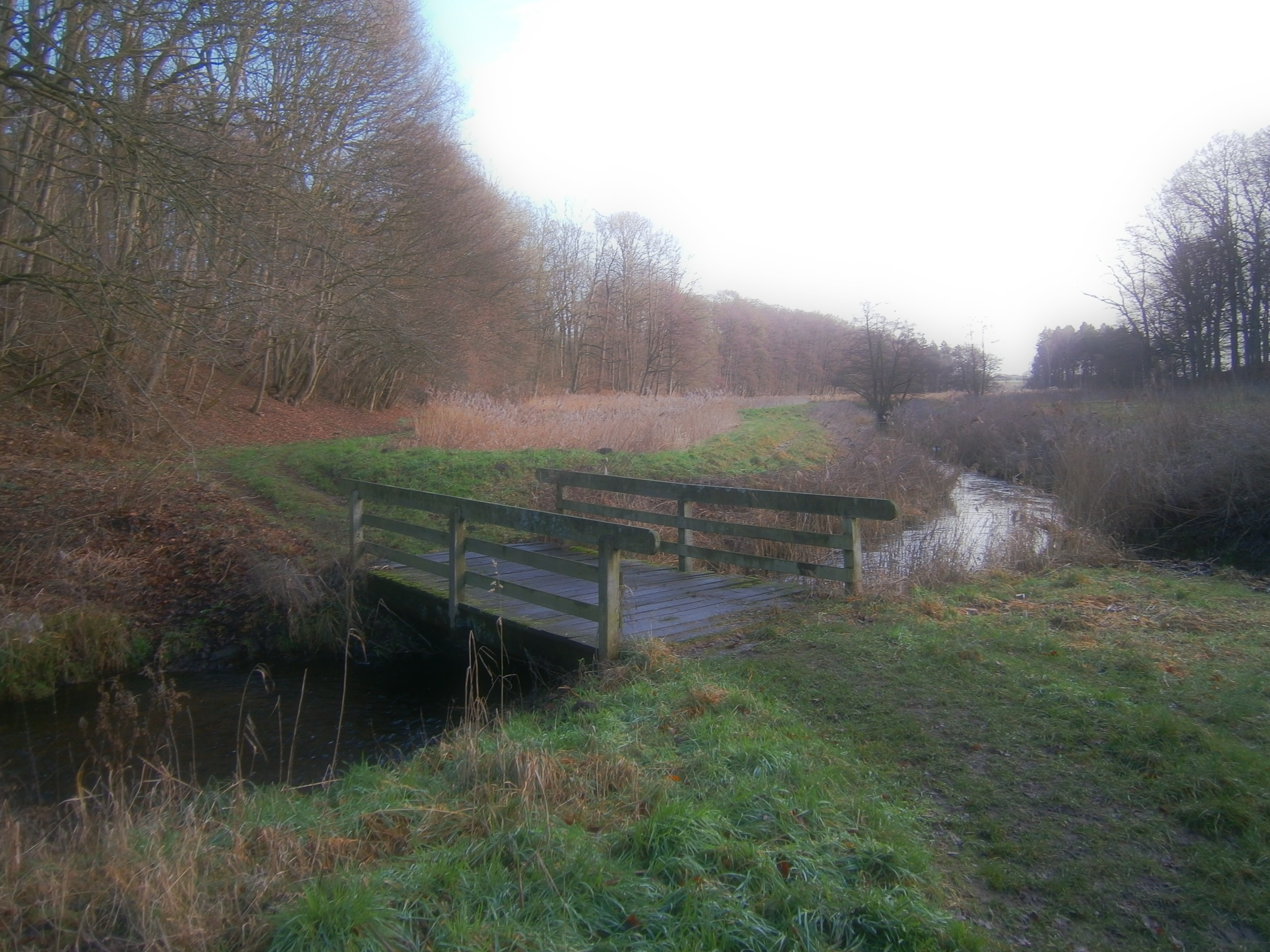 Die Norderbeste bei Grabau